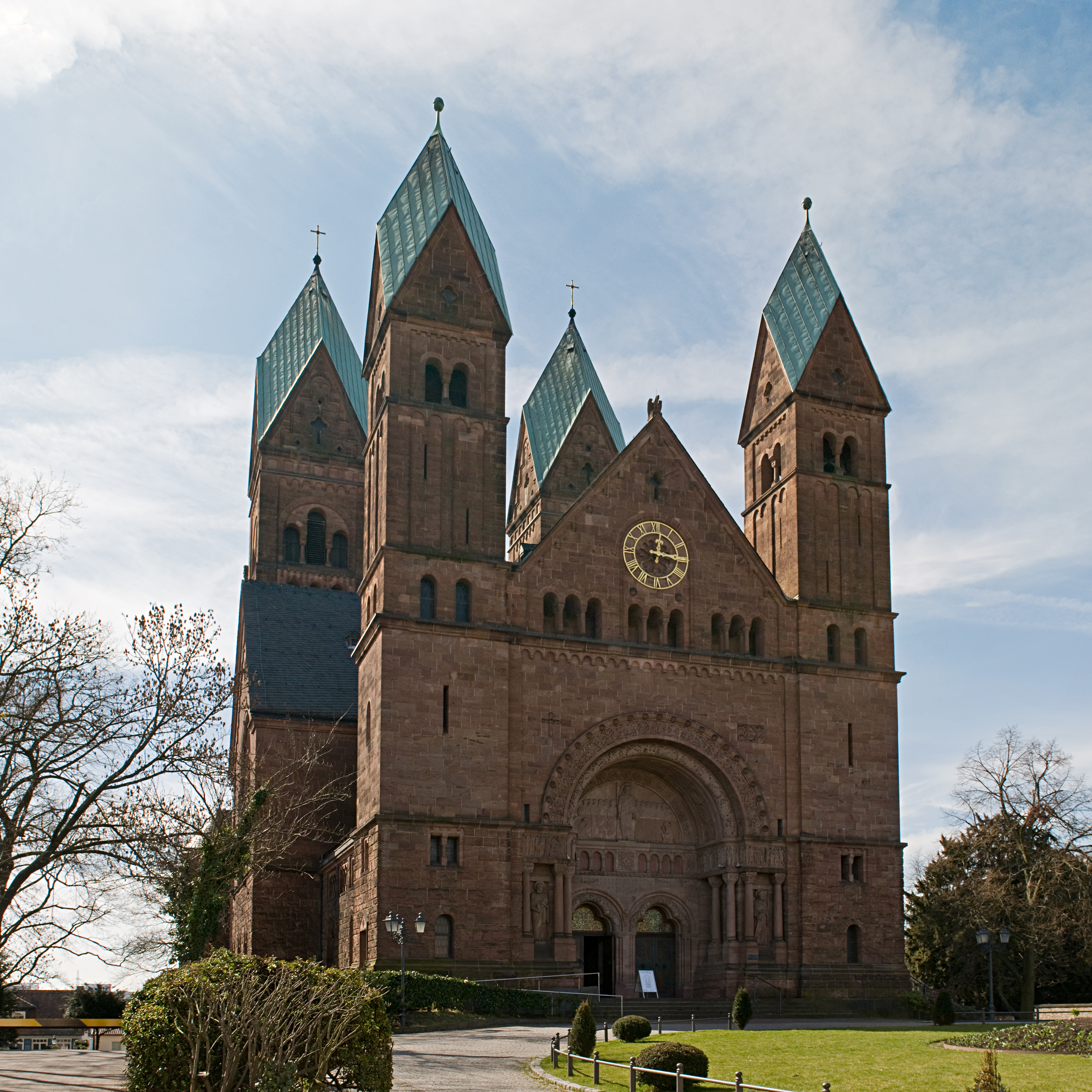 Erlöserkirche Bad Homburg: Frontalansicht von der Dorotheenstraße